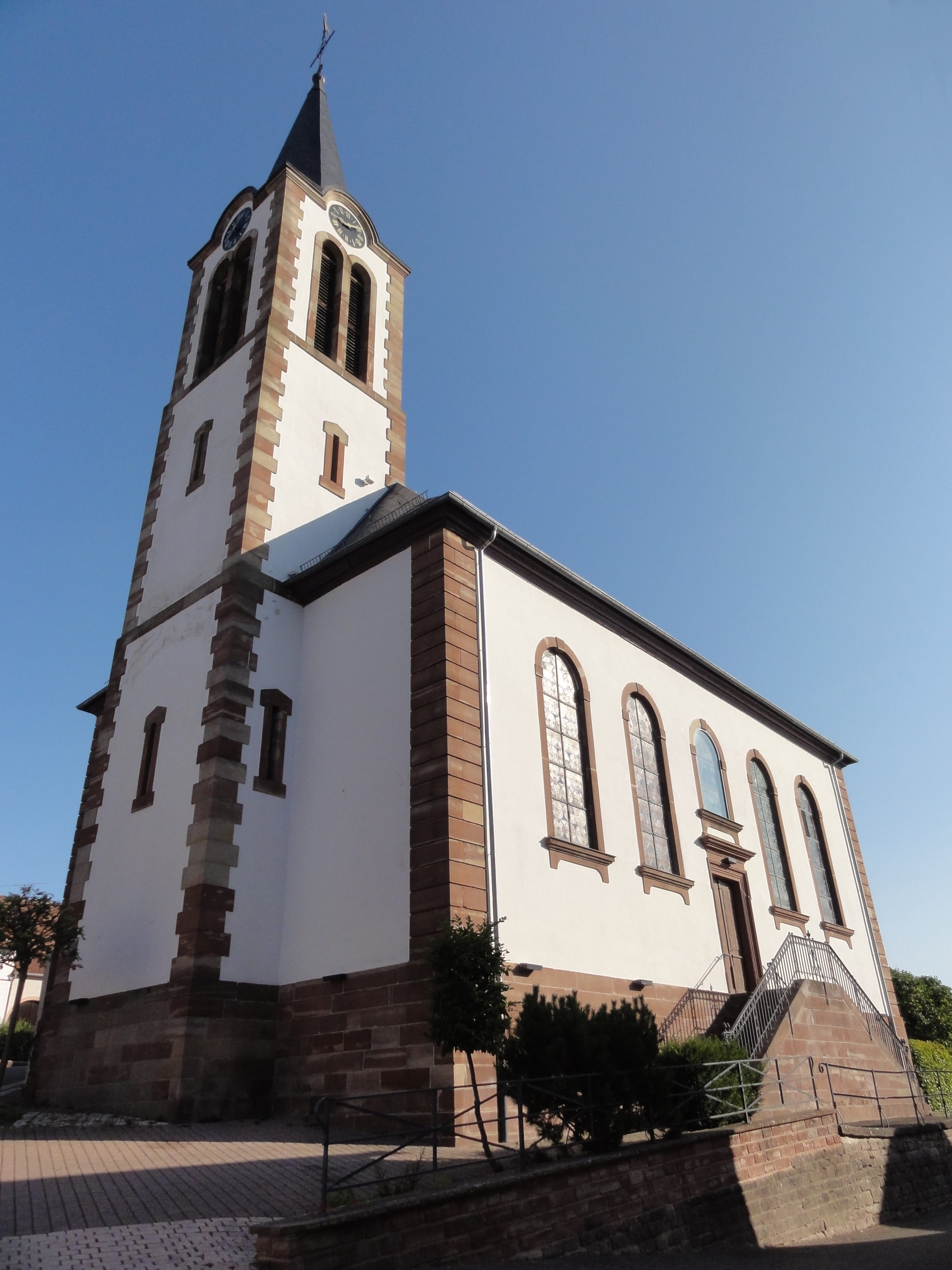 Alsace, Bas-Rhin, Drulingen, Église protestante (XVIIIe-XIXe), rue de Durstel: .